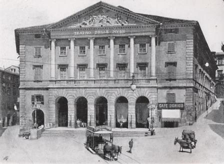 Ancona - Capolinea del tram a cavalli al Teatro delle Muse